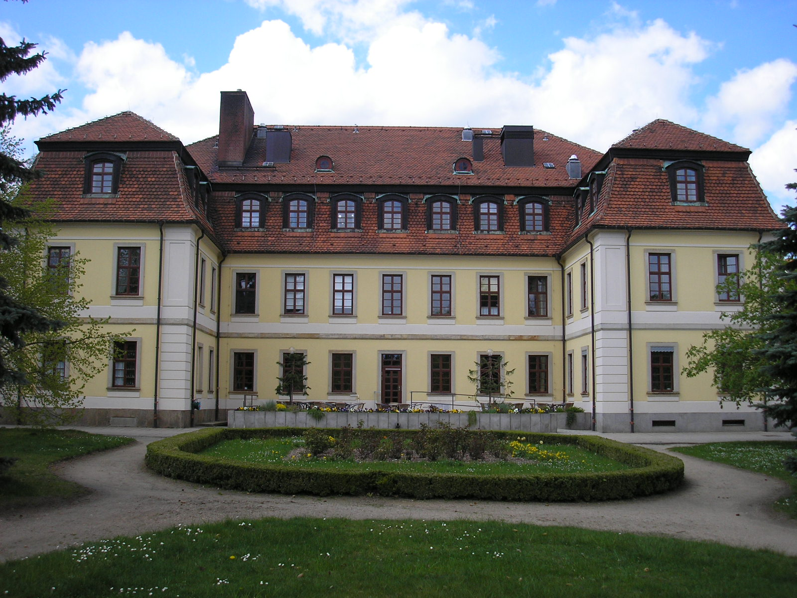 Herrschaftshaus, Fassade zum Herrschaftsgarten – Gebäude der Brüdergemeinde in Herrnhut (Sachsen).